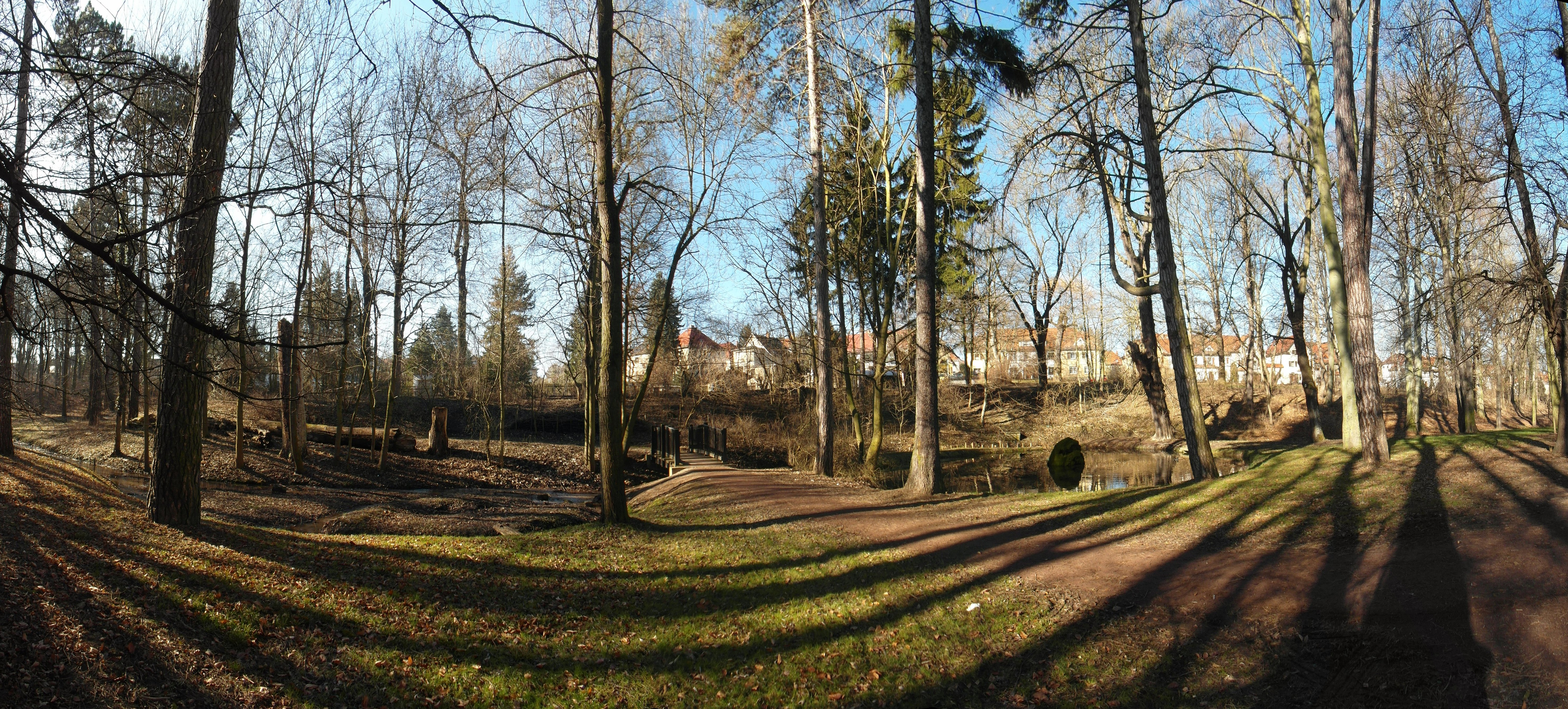 idyllischer Schoetener Grund Apolda